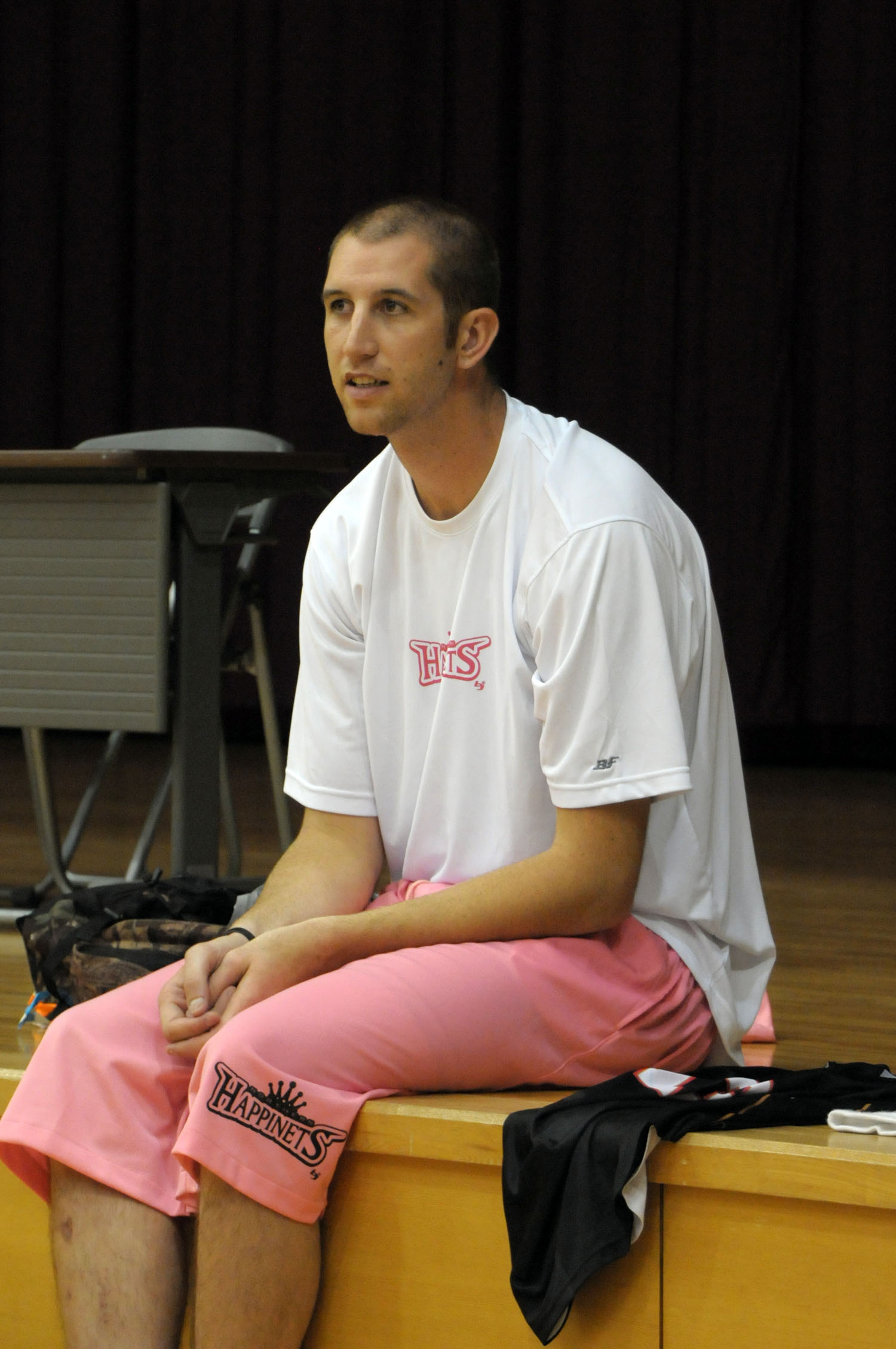 秋田ノーザンハピネッツ、チェイス・マクファーランド選手。琴丘総合体育館で。